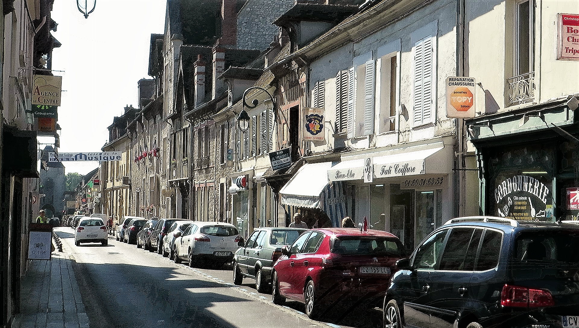 Hauptstrasse mit einem der beiden Stadttore (Bildhintergrund links)